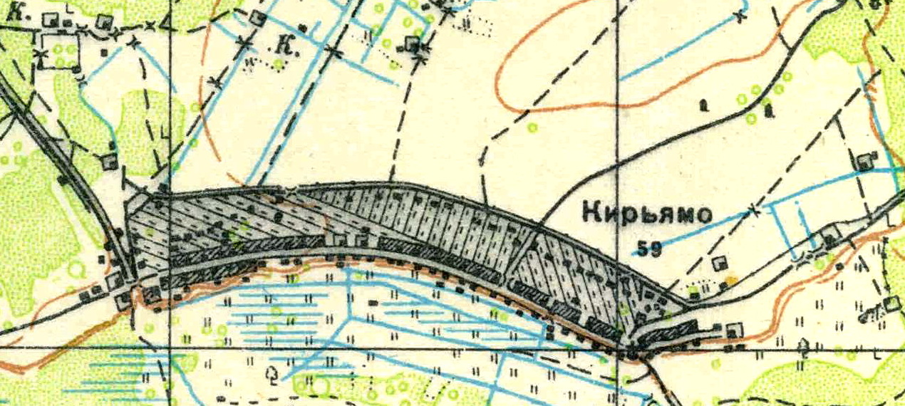 Топографическая карта Ленинградской области, квадрат О-35-21-А-а (Кирьямо), деревня Кирьямо.